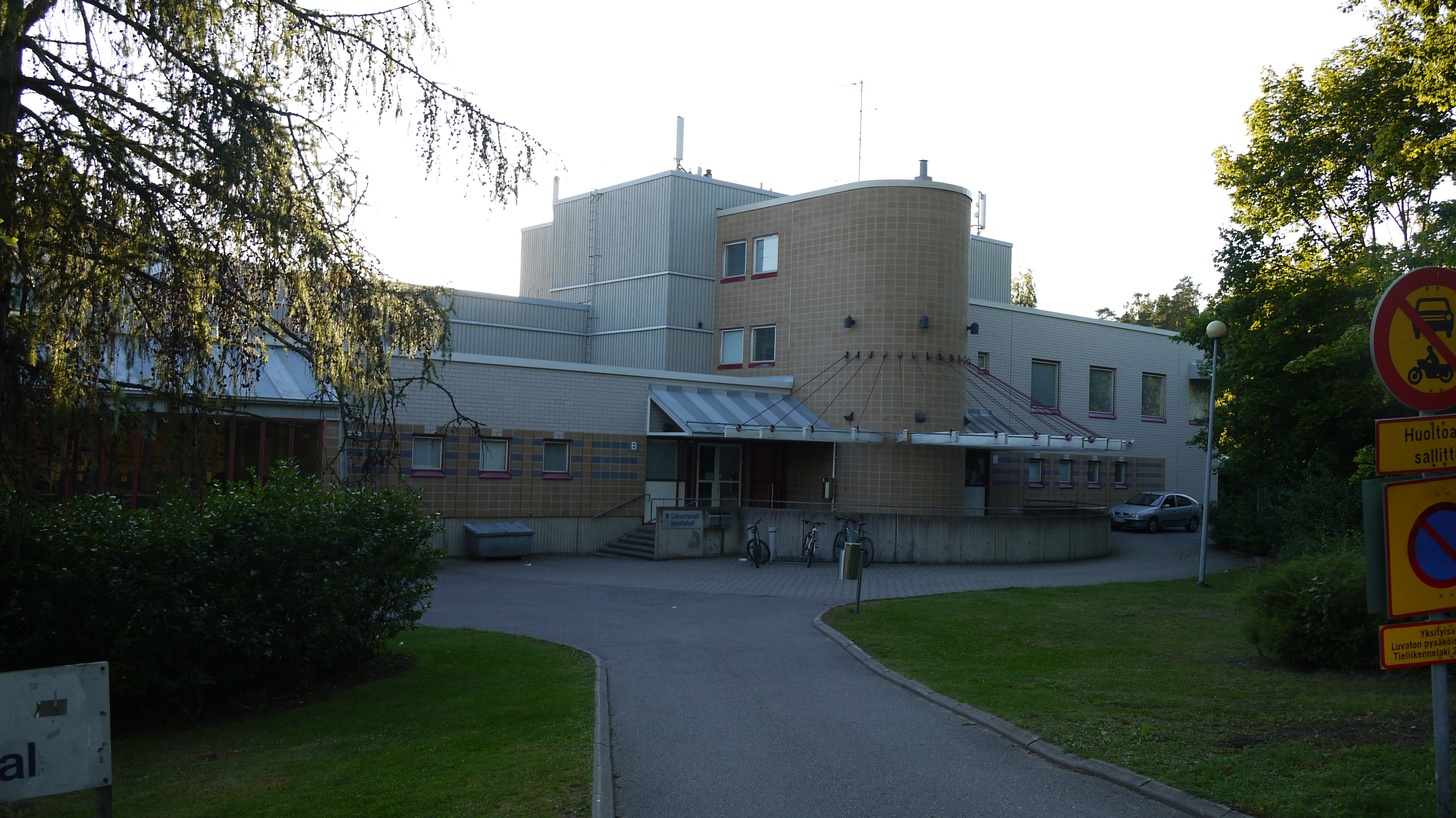 Leppävaaran Urheiluhalli Espoon Leppävaarassa